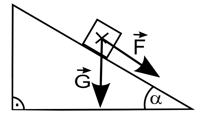 Nakloněná rovina - jednoduchý stroj